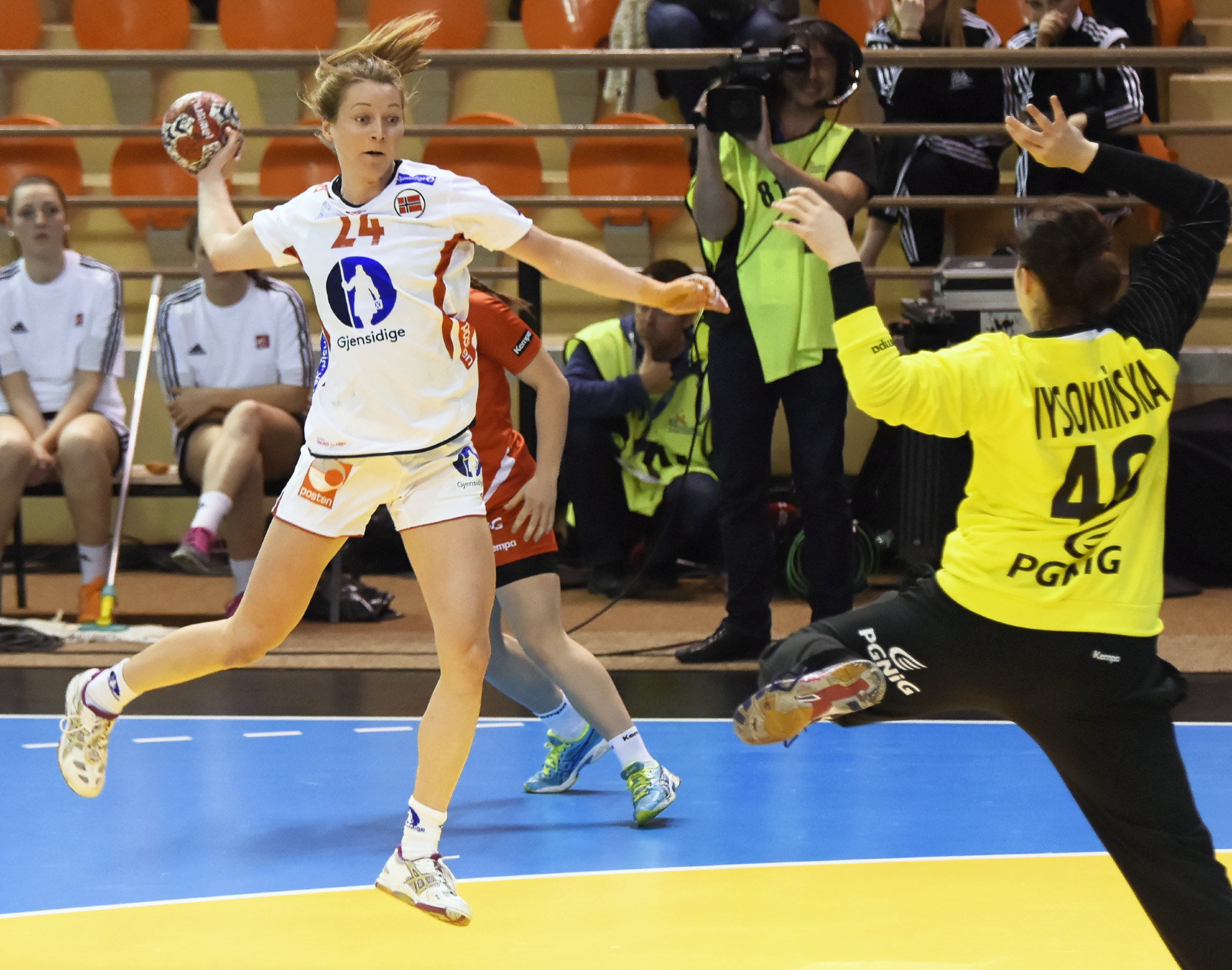 Rencontre entre la Pologne et la Norvège lors de la Golden League de handball. A Dijon, le 19 mars 2015.